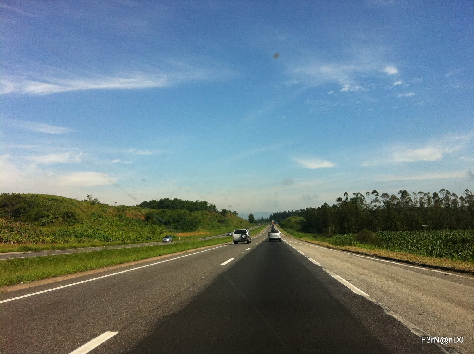 Cajati - SP